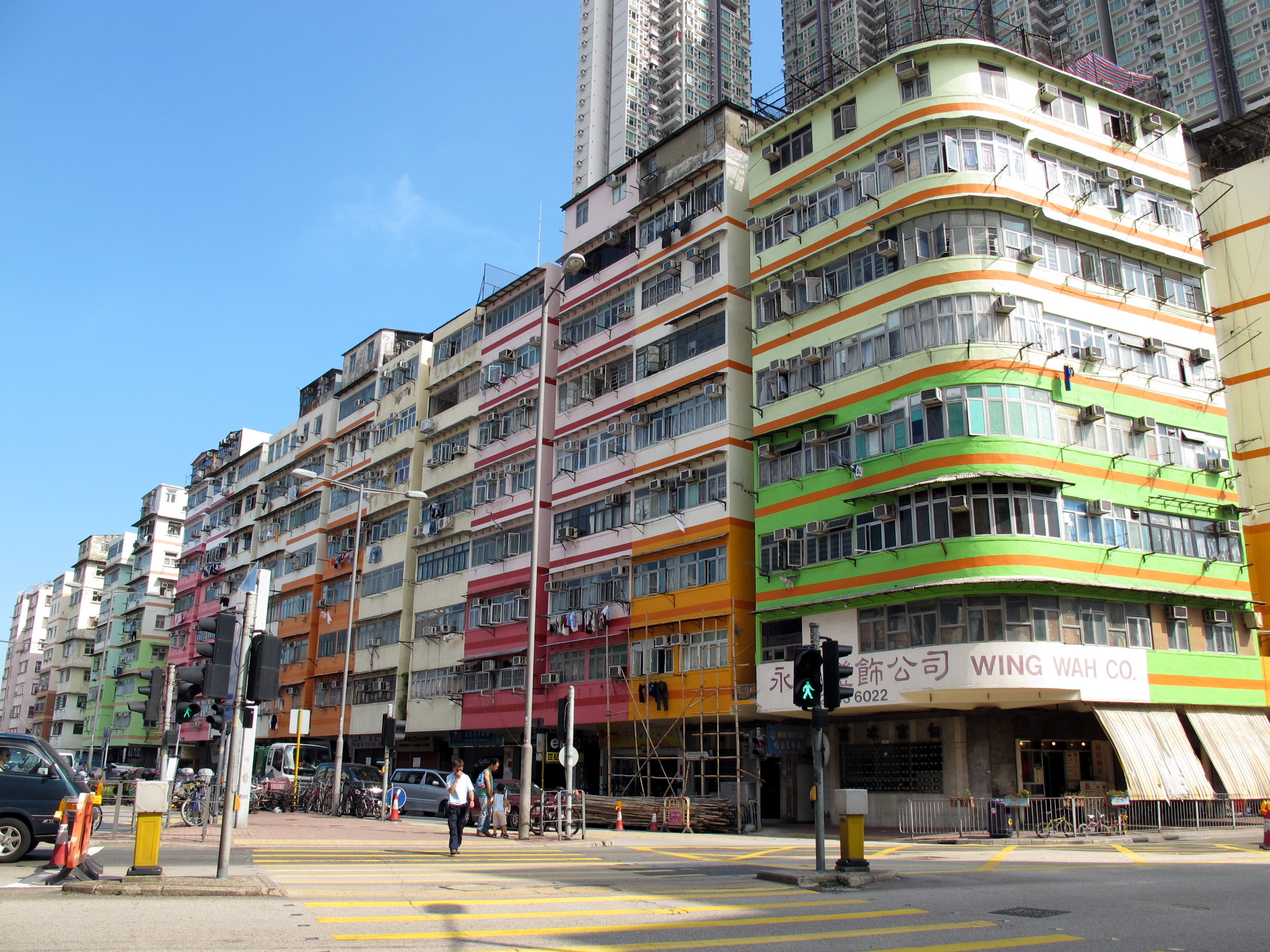 Ma Tou Kok Road No.91-113